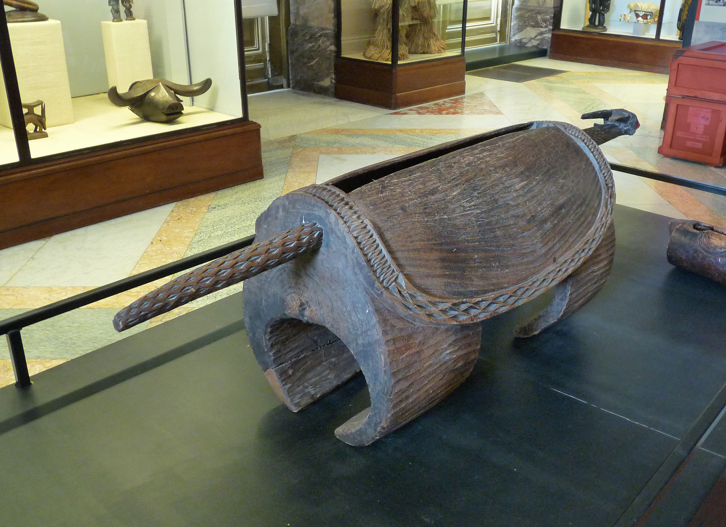 Loï : grand tambour à fente zoomorphe, présenté à Tervuren dans le cadre de la section coloniale de l'Exposition universelle de 1897 à Bruxelles. Musée royal de l'Afrique centrale